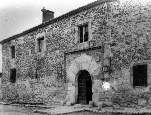 Palacio - Mojados (Valladolid) - Cuaderno. Álbum de Valladolid - Fotografía 60 x 42 B/N